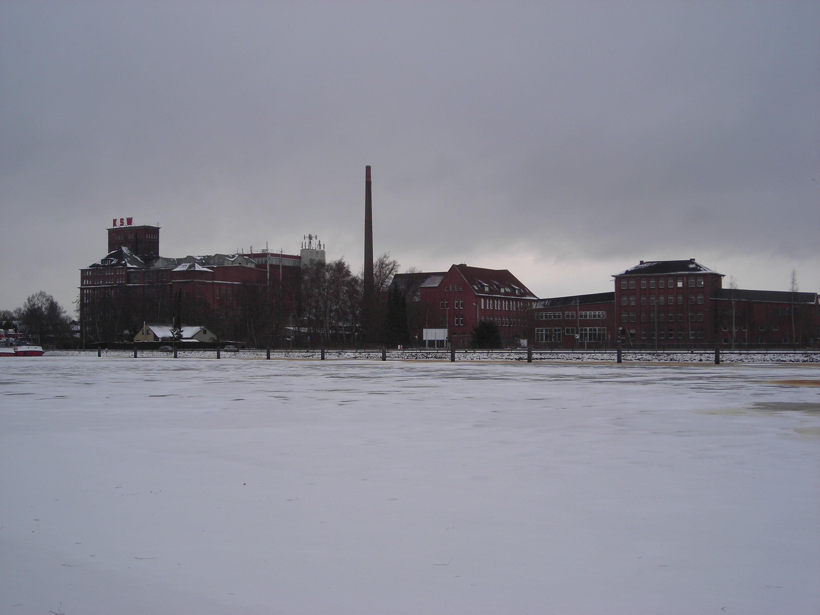 Der Gebäudekomplex der ehemaligen UTO- oder Westwerft in Wilhelmshaven mit dem Gebäude der ehemaligen Kammgarnspinnerei Wilhelmshaven (KSW).